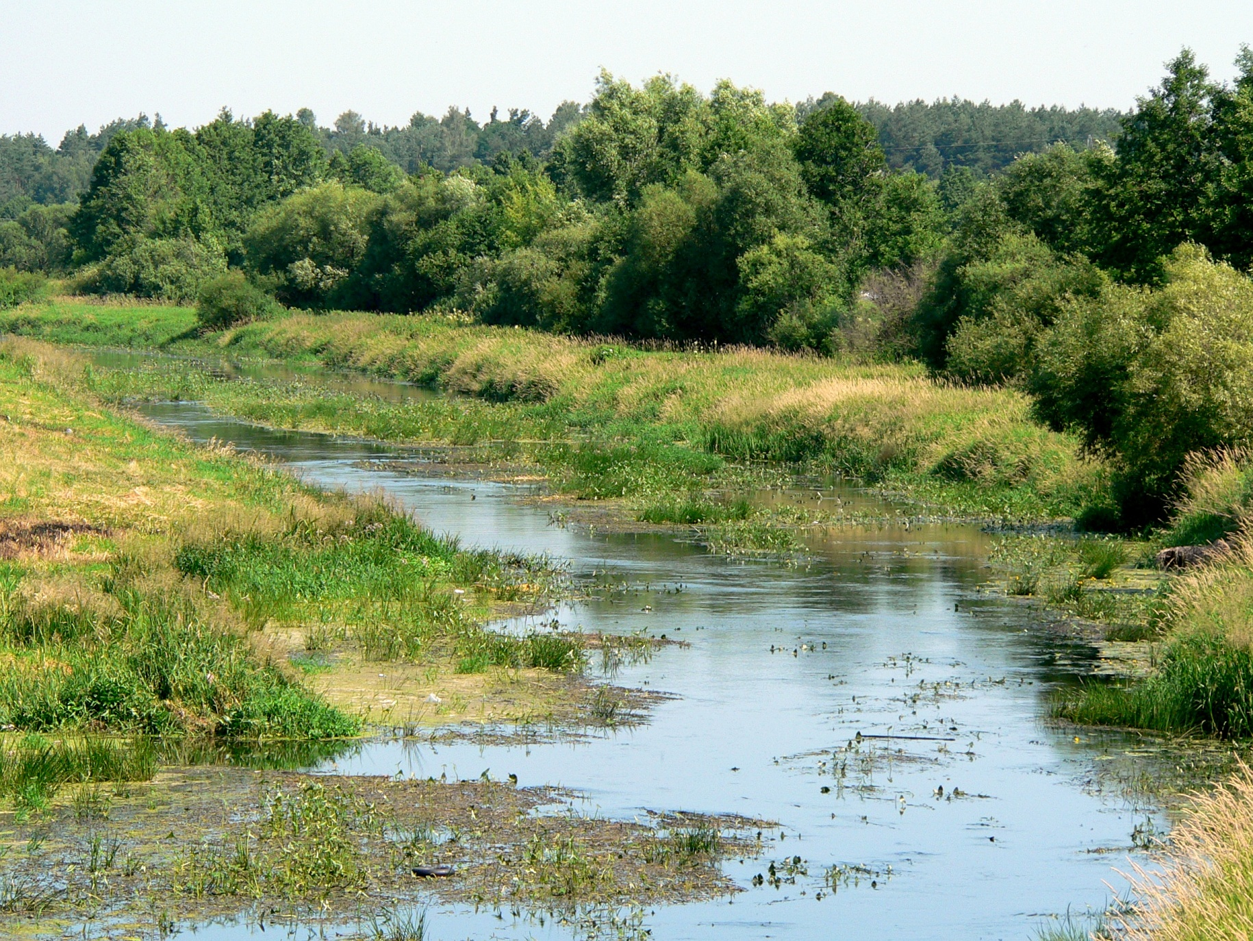 Description: Orzyc river near Maków Mazowiecki, Poland Opis: rzeka Orzyc w Makowie Mazowieckim (niski stan wody). Source: Picture taken in July, 2005 and uploaded by Marek K. Misztal